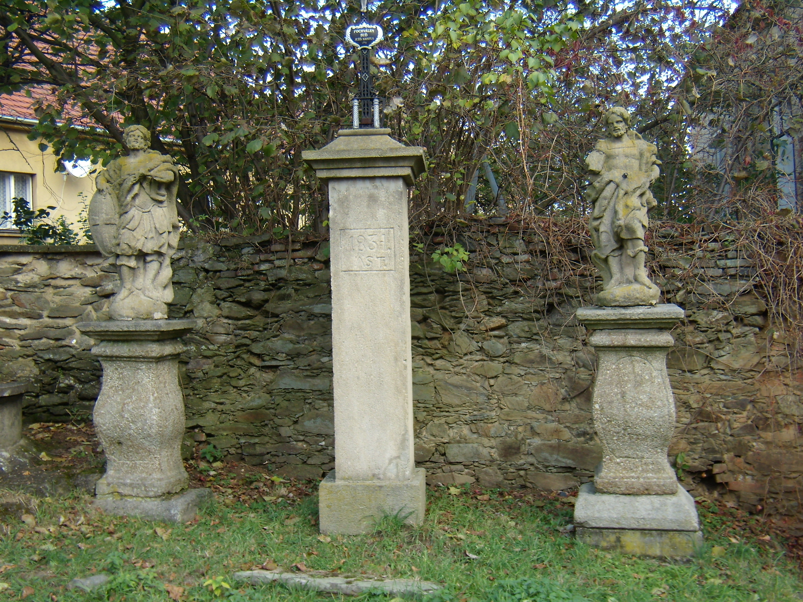 Chudenice - sochy sv. Jana a Pavla